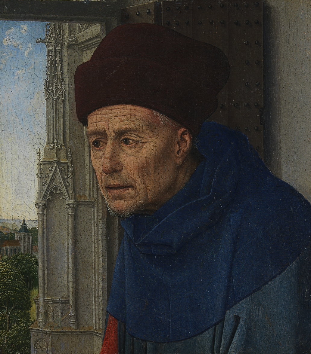 een deel van een opgedeeld origineel, zie Maria Magdalena leest